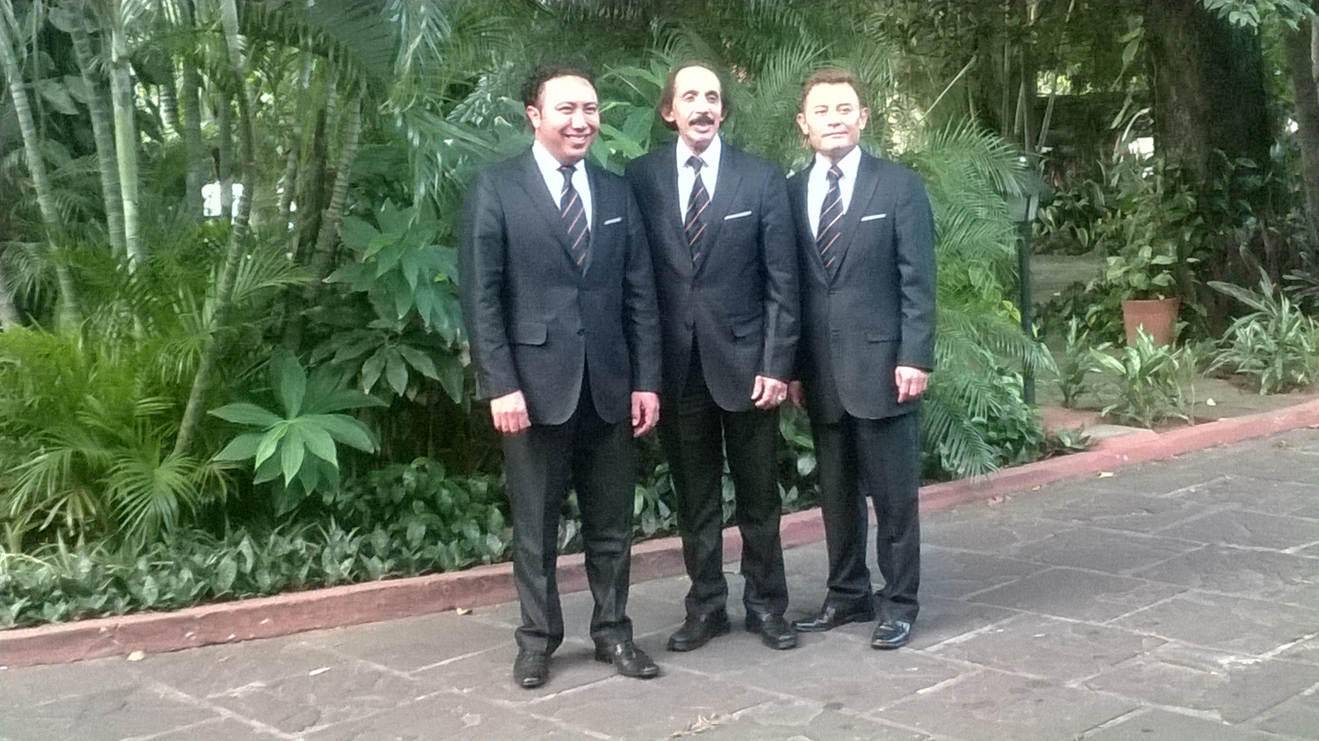 Fotografia en Conferencia de Prensa en Asunción, Paraguay con motivo de la gira de los 70 años de la fundación de Los Panchos